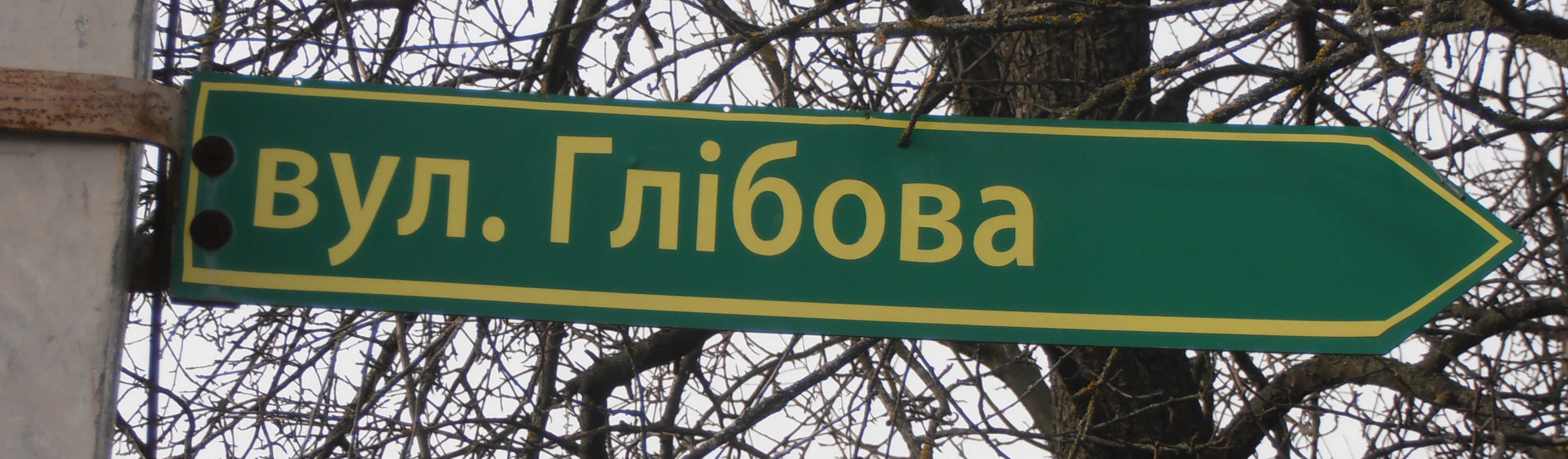 Вказівник